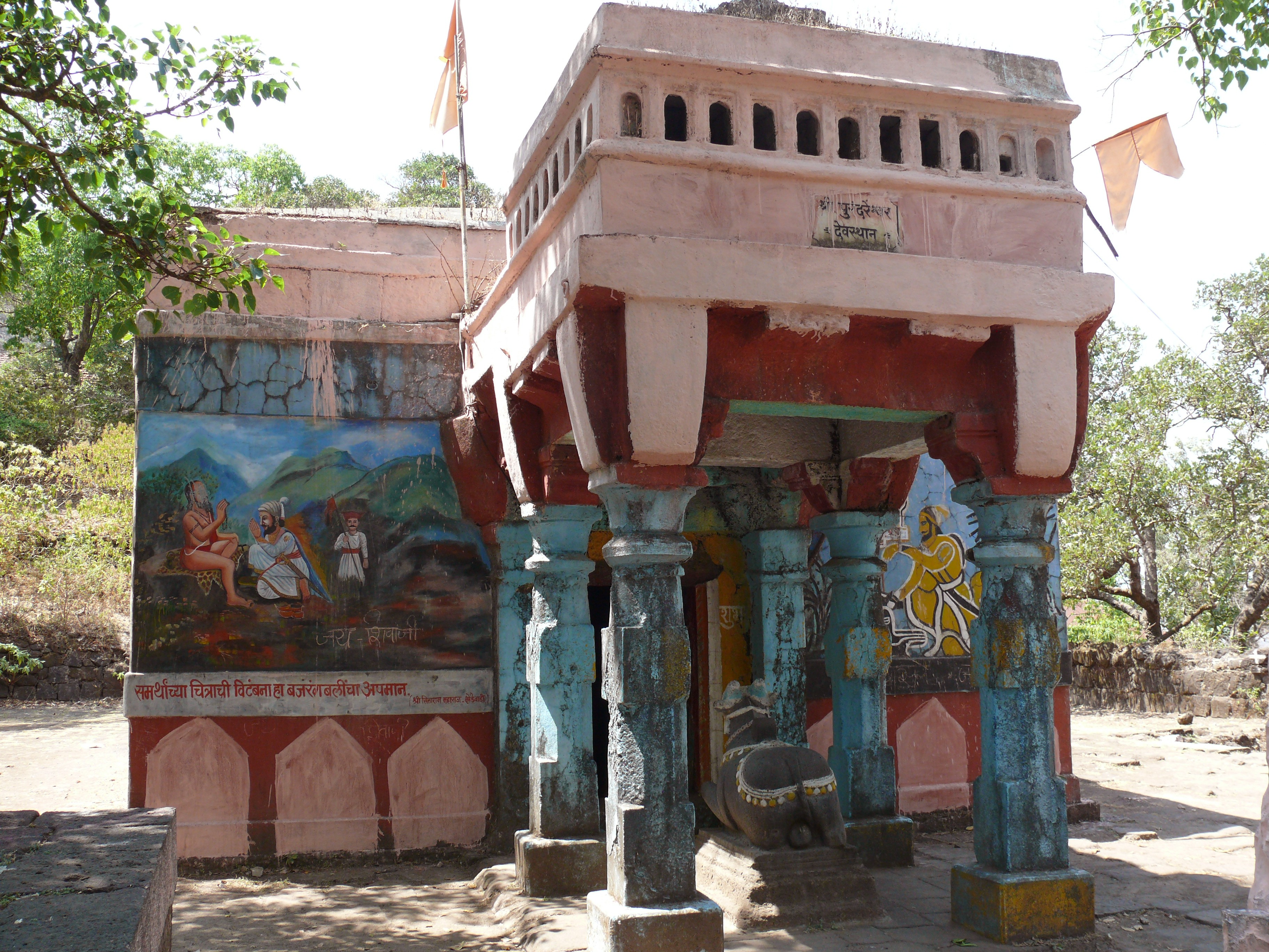 Purandar Fort